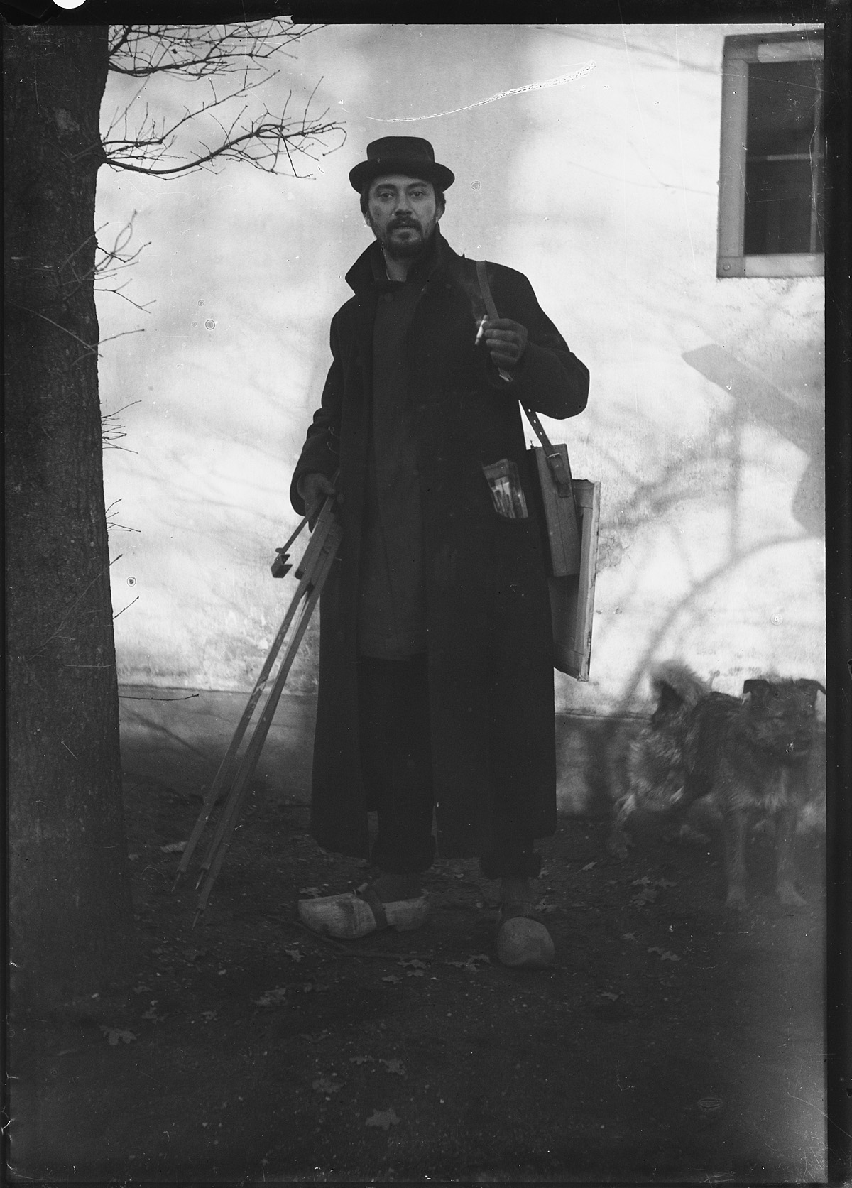 Glasnegatief. Zelfportret Willem Witsen staand voor de muur van Villa Zonneberg, Ede. (cf. Vergeer, p. 153)